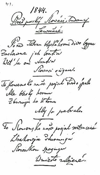 Nad Tatrou sa blyska, Future Levocians